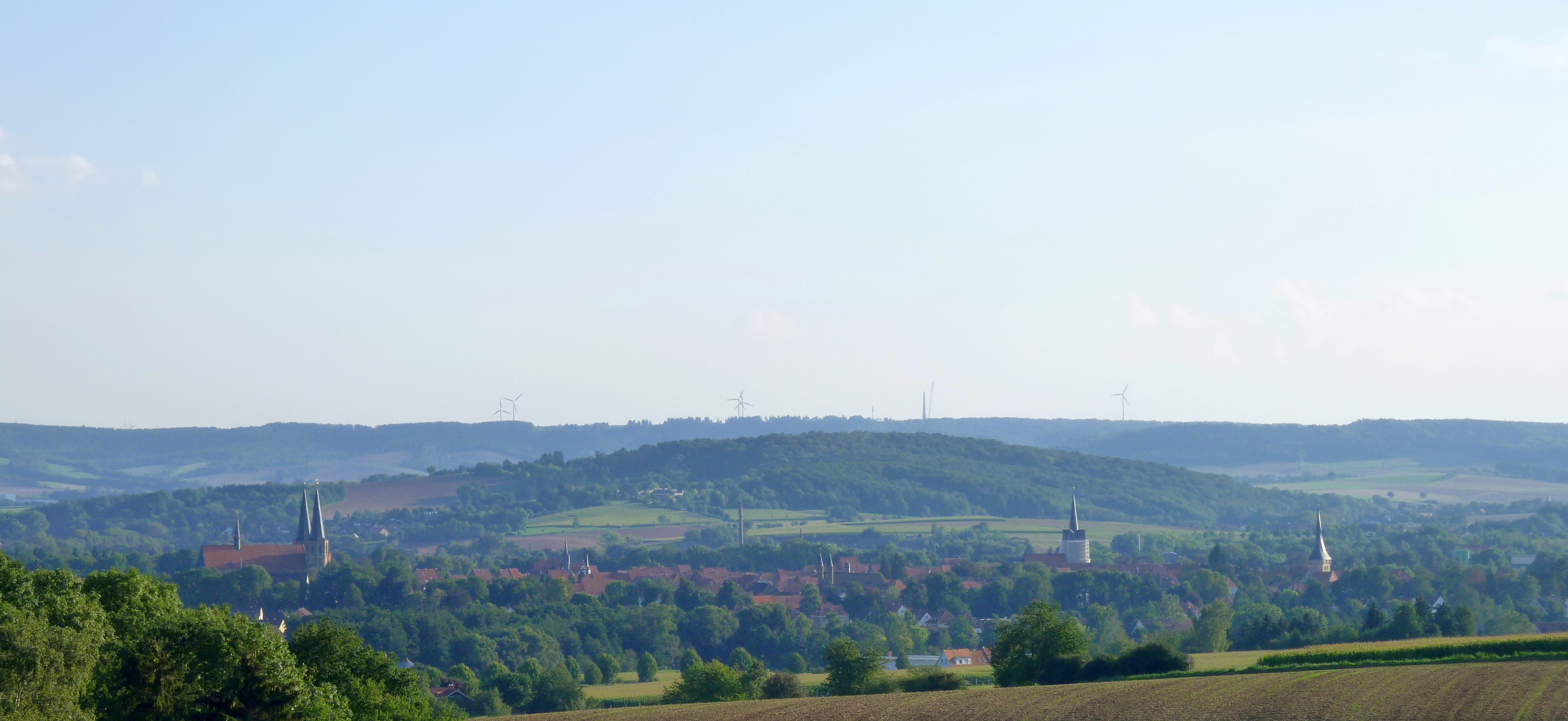 Blick von Nordnordosten über Duderstadt auf den Pferdeberg. Im Hintergrund die Bergkette Bodenberg - Roter Berg - Gehlenberg